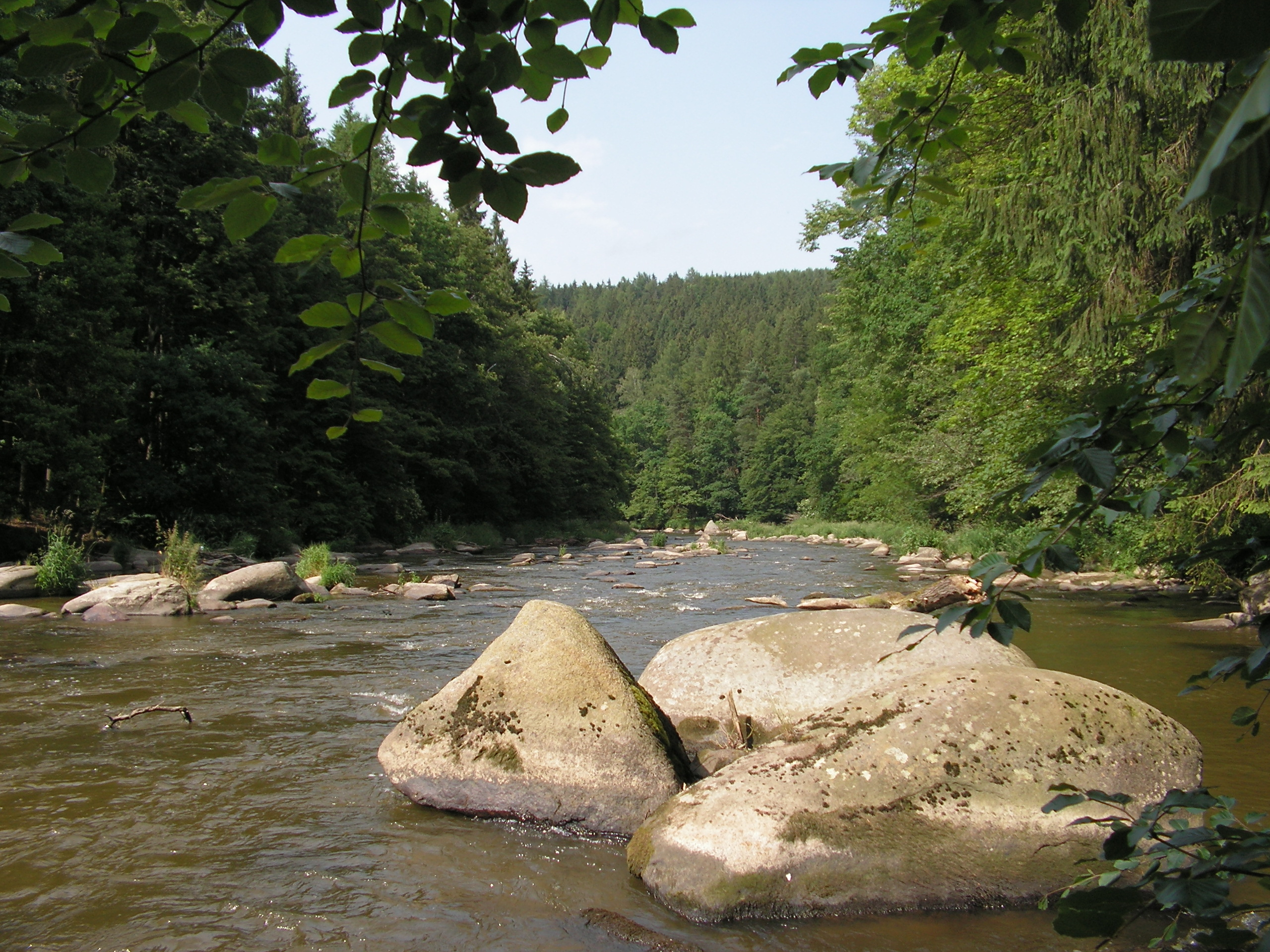 Stvořidla na řece Sázavě.